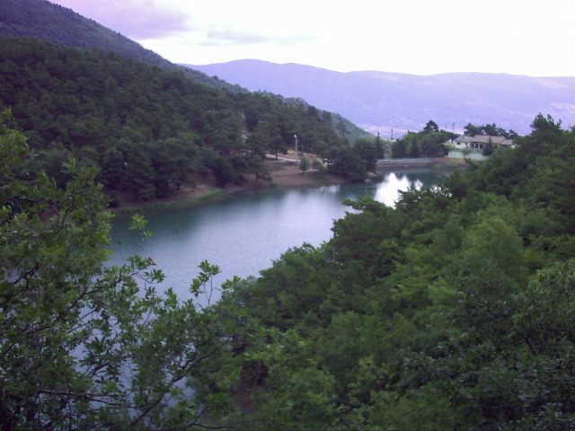 Borabay Gölü,Amasya,Türkiye